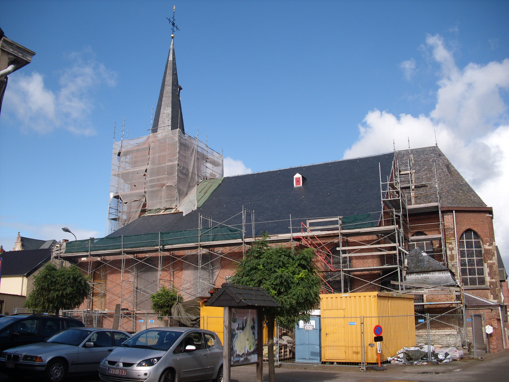 Sint-Stefaankerk - Lippelo - Sint-Amands - Provincie Antwerpen - Vlaanderen - België. Tijdens de restauratiewerken in 2010. Federatie Puurs Dekenaat Klein-Brabant Vicariaat Vlaams-Brabant Aartsbisdom Mechelen - Brussel